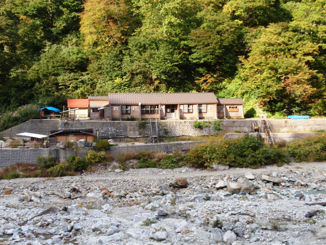 富山県黒部峡谷温泉郷、祖母谷温泉全景